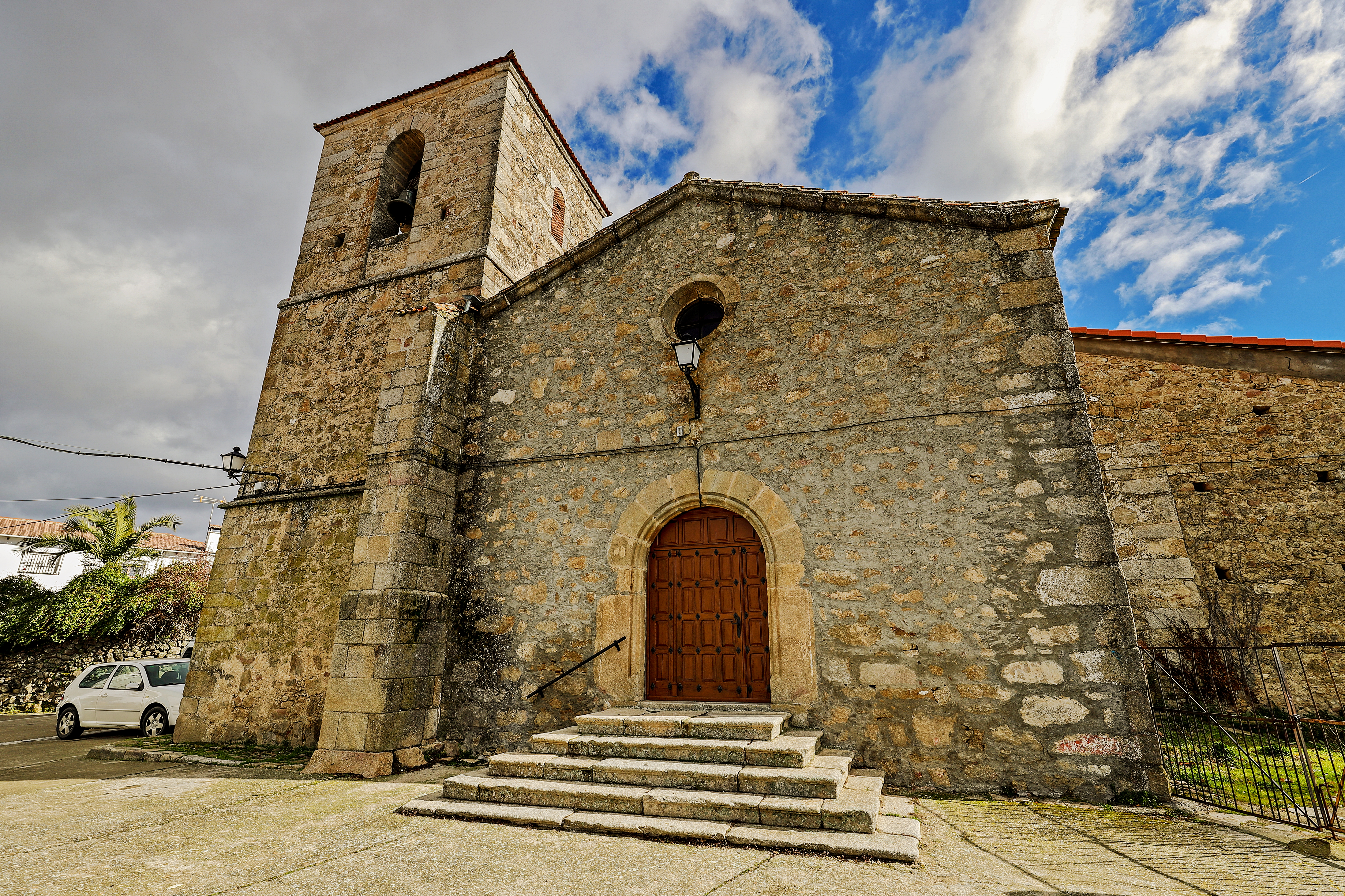 Cabezabellosa es un municipio de la comarca de Trasierra en la provincia de Cáceres.